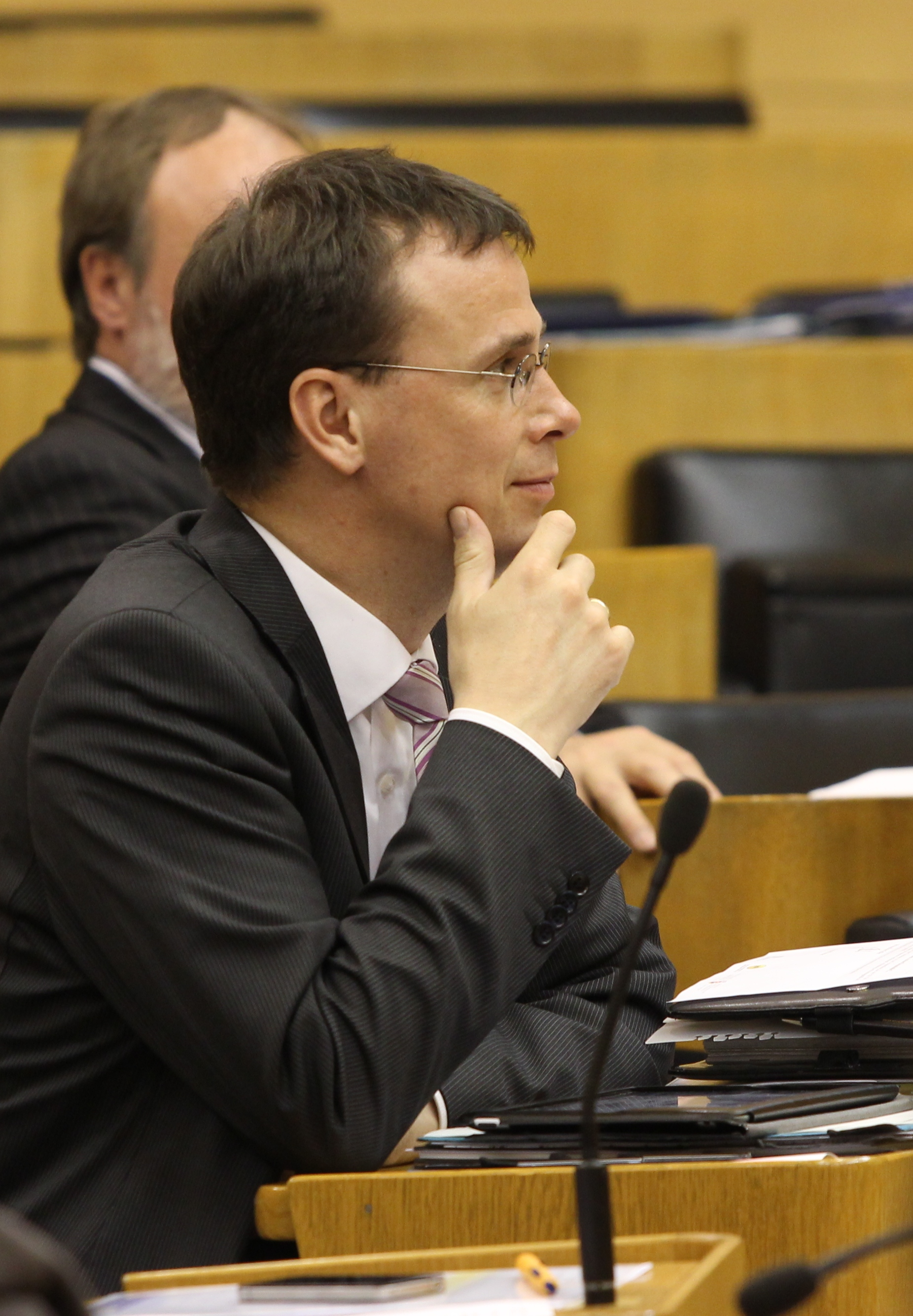 Volker Schebesta im Plenarsaal des Landtages von Baden-Württemberg. Wikipedia im Landtag – Baden-Württemberg 15.–16. Mai 2013 in Stuttgart Fragen zur Nachnutzung Wenn Sie Fragen zur Nachnutzung dieses Bildes haben, können Sie sich jederzeit gern an wenden Personality rights warningAlthough this work is freely licensed or in the public domain, the person(s) shown may have rights that legally restrict certain re-uses unless those depicted consent to such uses. In these cases, a model release or other evidence of consent could protect you from infringement claims.